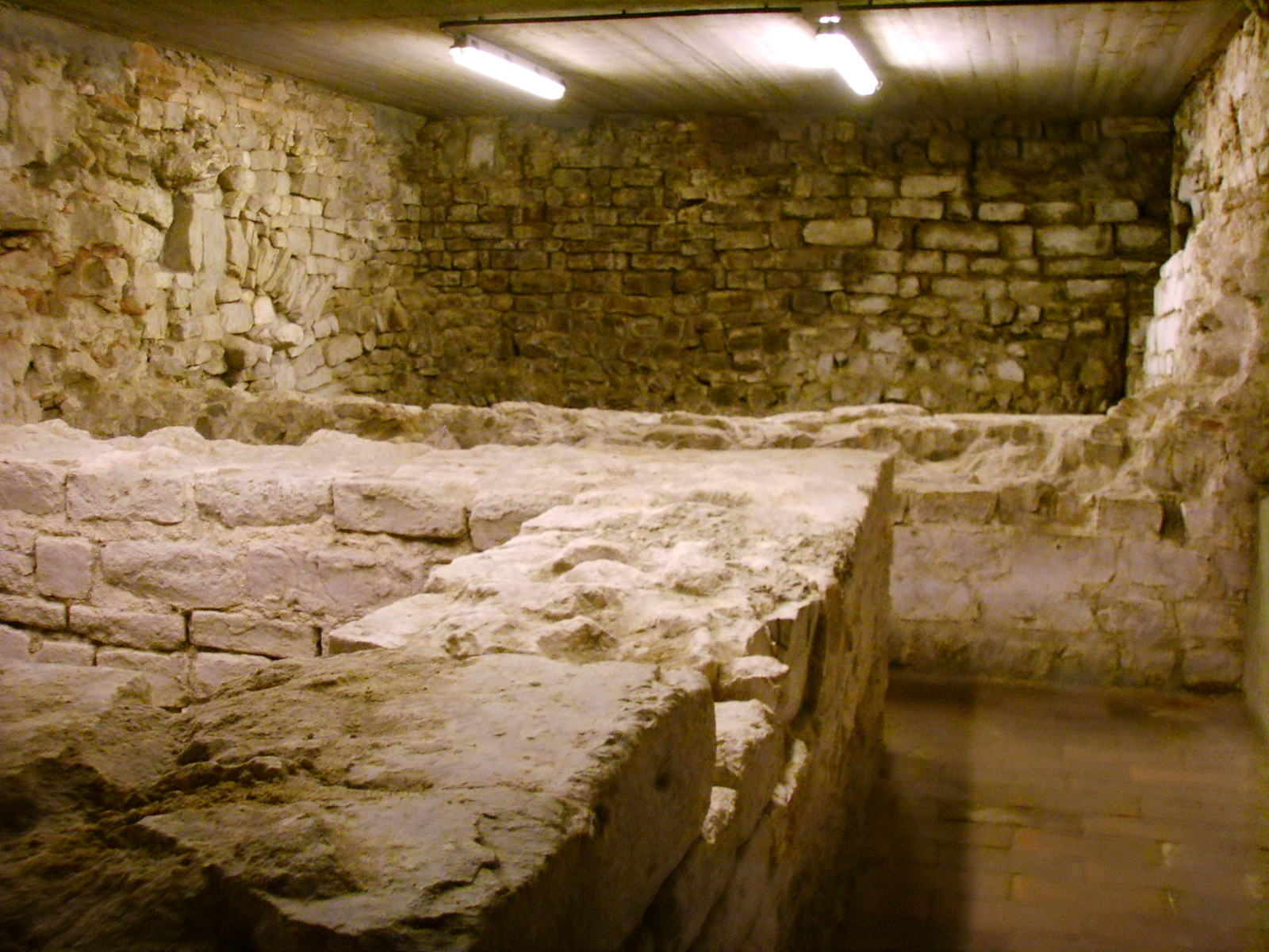 Museo della pagliazza, resti delle terme romane